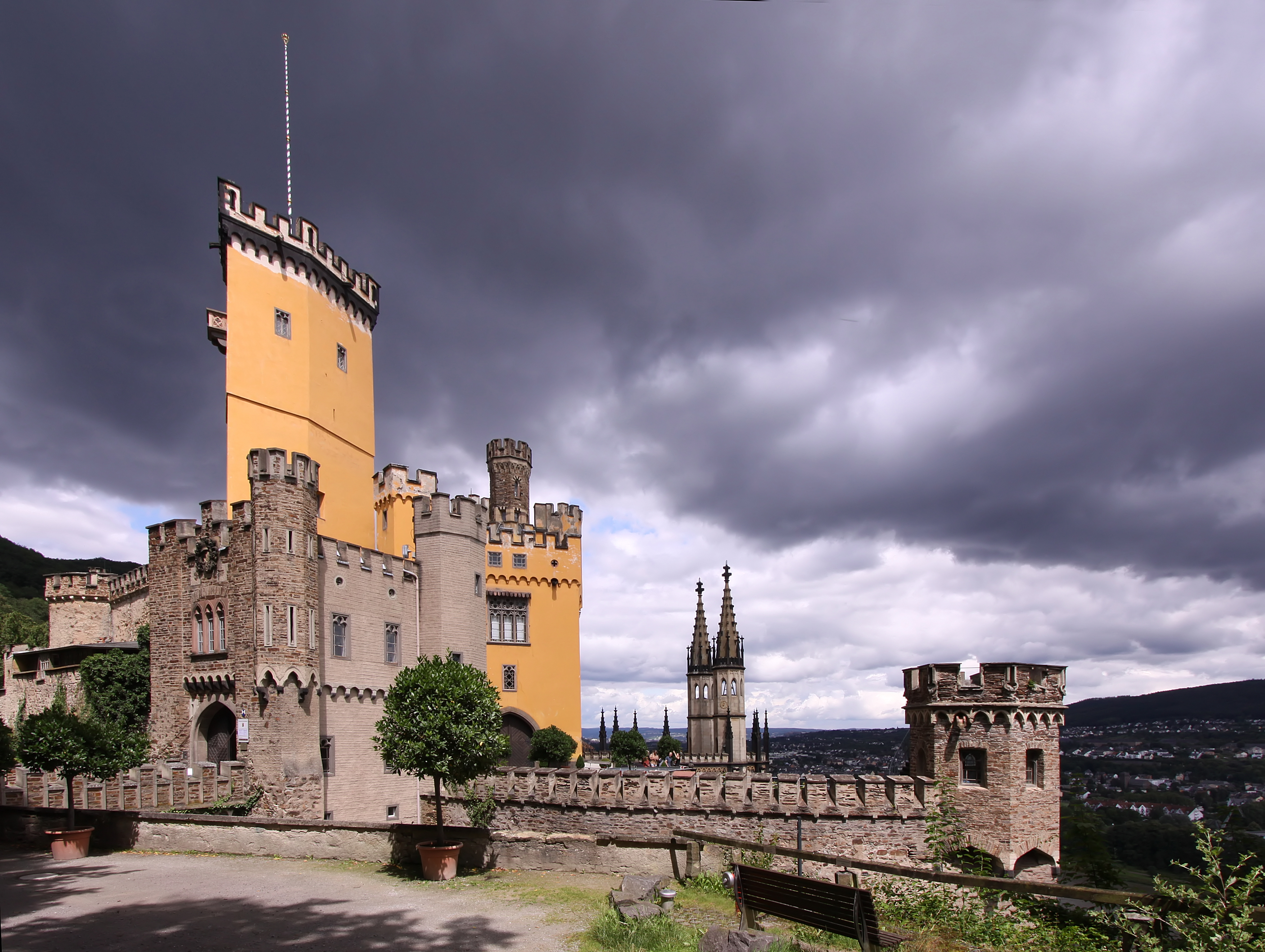 Neugotisches Schloss Stolzenfels am Rhein bei Koblenz/Deutschland